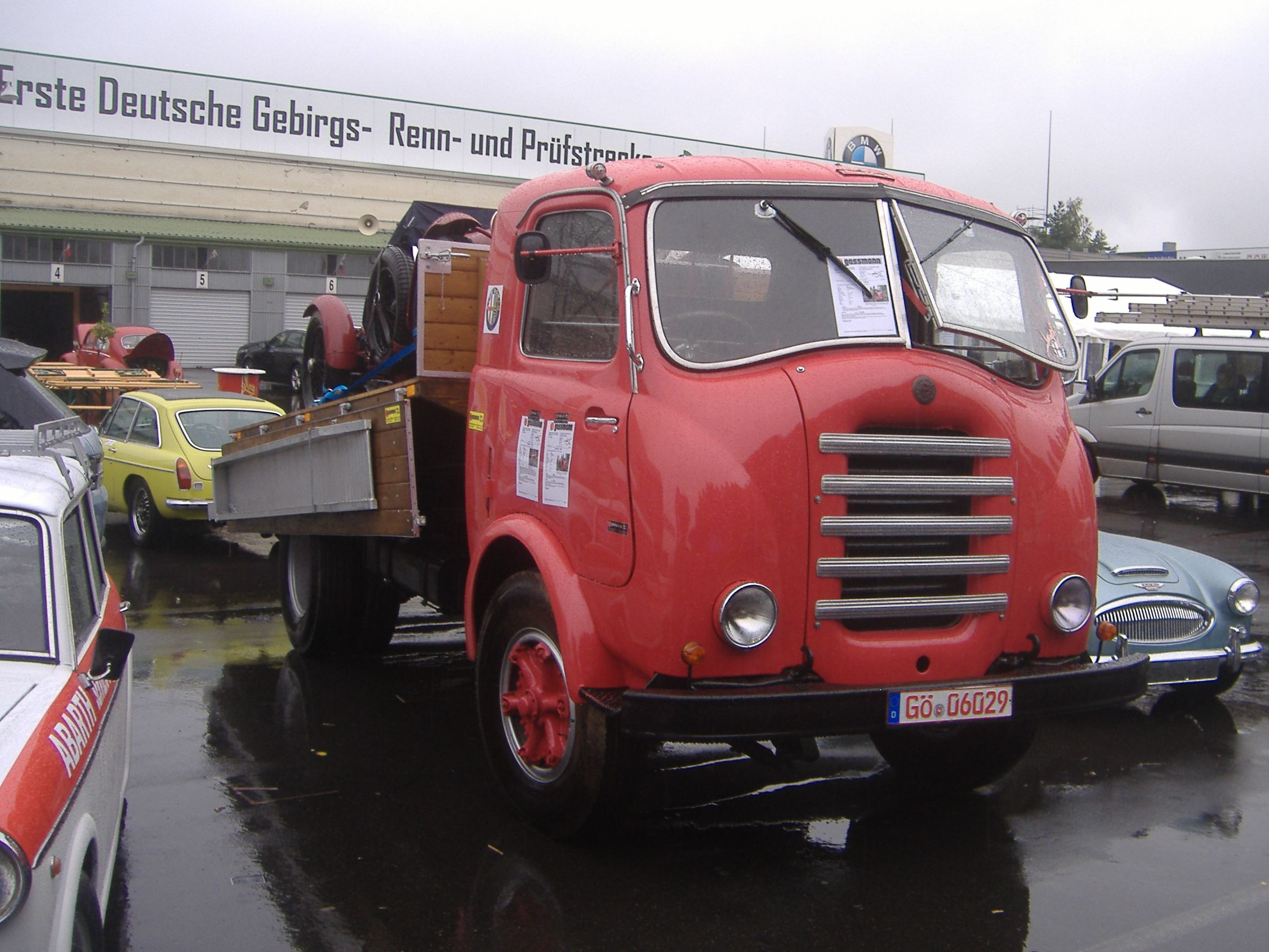 Alfa Romeo 455 Autotransporter LKW AVD Oldtimer Grand Prix 2014 - fotographiert im alten Fahrerlager des Nürburgrings Fahrzeugdaten lt. Aushang im Fahrzeug: Erstzulassung: 01.11.1955 Motorisierung: 62KW / 85PS 6,3L Dieselmotor